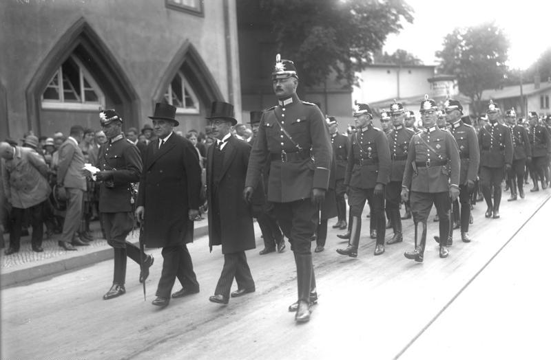 Die feierliche Beisetzung der ermordeten Schupo-Offiziere in Berlin! Die Führer der Berliner Schutzpolizei von links nach rechts: Kommandeur Heimannsberg, Polizeipräsident Grzesinski, Polizeivizepräsident Dr. Weiss, und der Vizekommandeur im Trauerzuge.